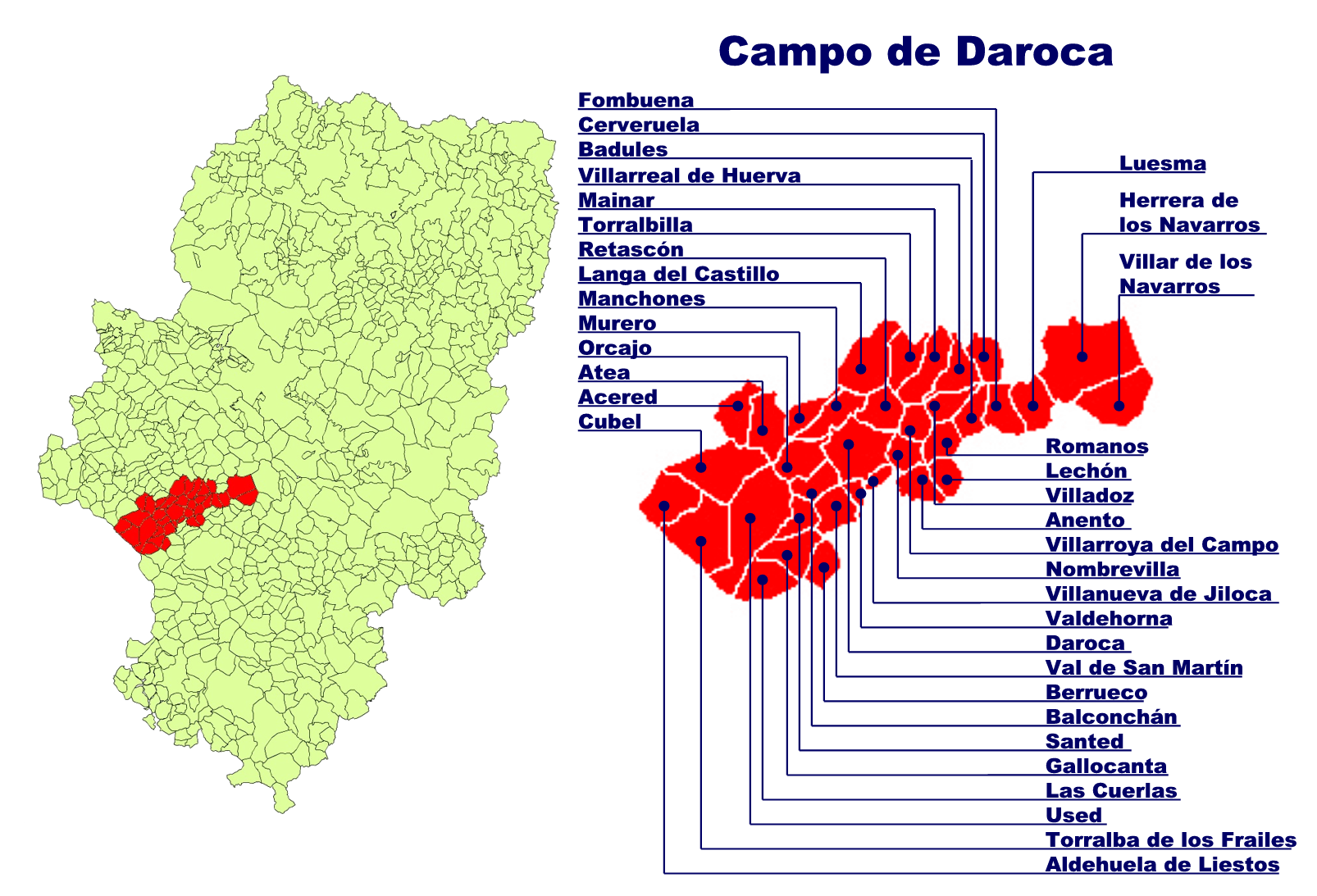 Comarca de Campo de Daroca Creado el 15.10.2005 por Ecelan en base a Image:Aragon municipalities.png